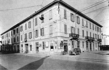 Biassono 1950s